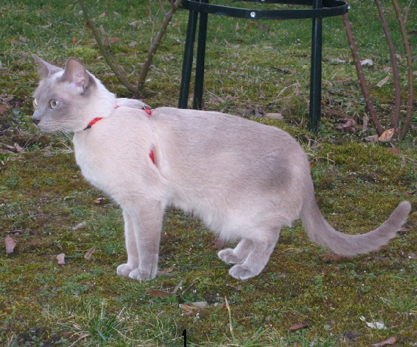 Chat tonkinois lilac mink (chatterie de l'Esprit d'Edenvane)